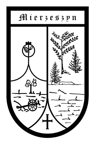 Herb wsi Mierzeszyn